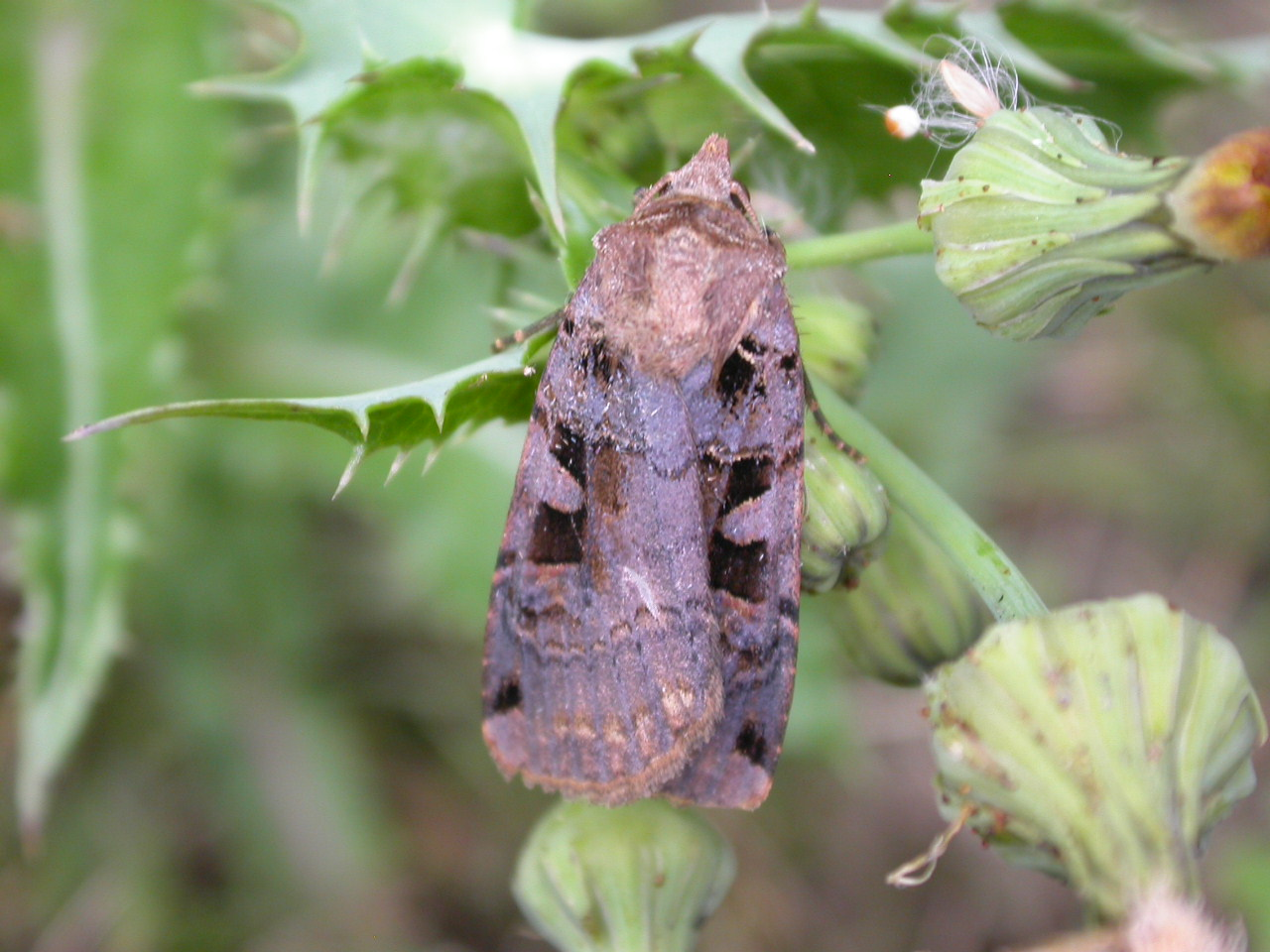 Xestia triangulum, Saligos, Hautes-Pyrénées, SW France, 8/9 July 2003